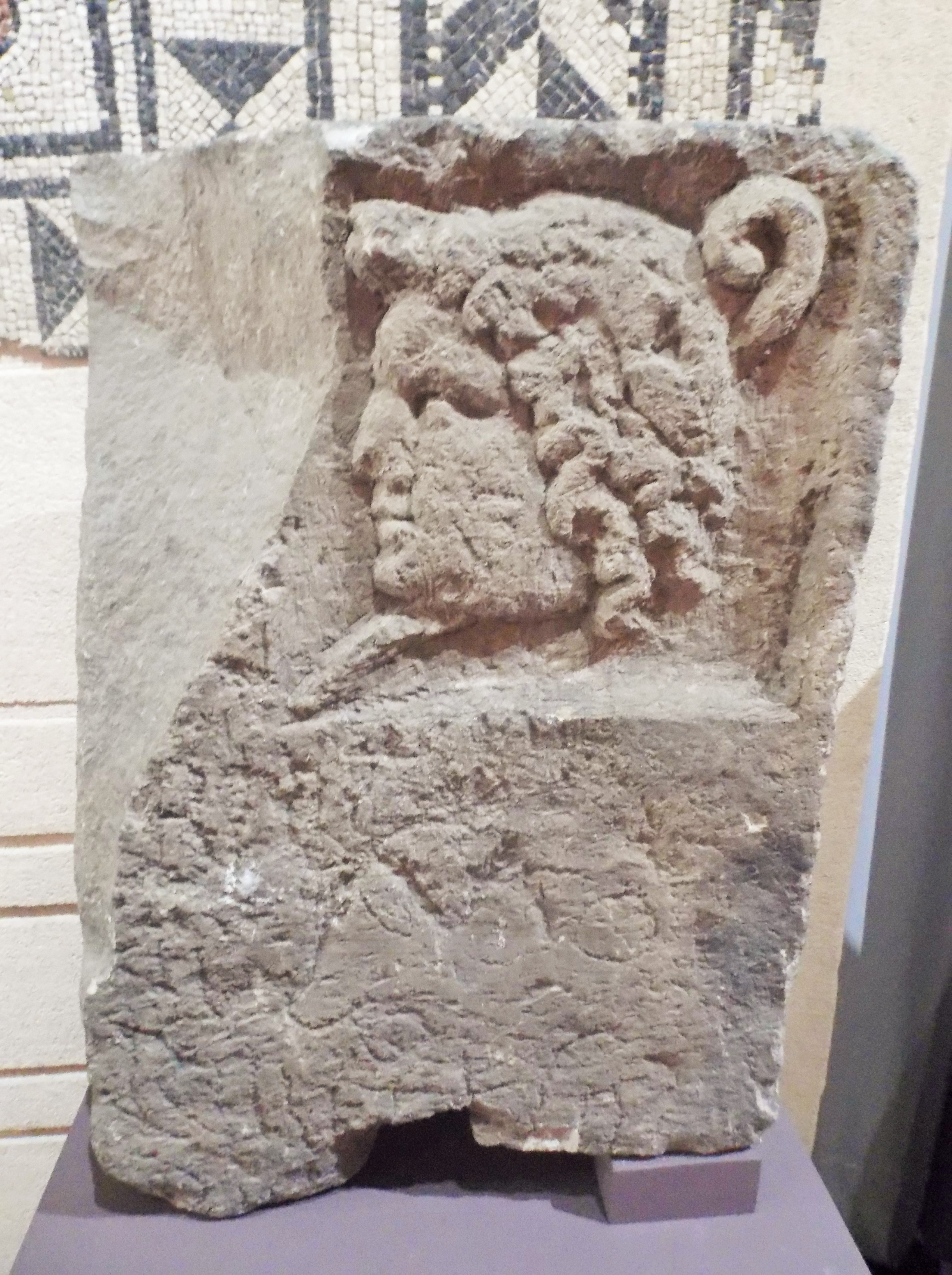 Stèle à l'effigie de Mercure. Matériau : trachyte (carrières du Kilian). IIe siècle après J.-C. Provenance : Orcines, temple de Mercure du sommet du Puy-de-Dôme. Musée Bargoin, Clermont-Ferrand, France. Inv. 64.746.1.